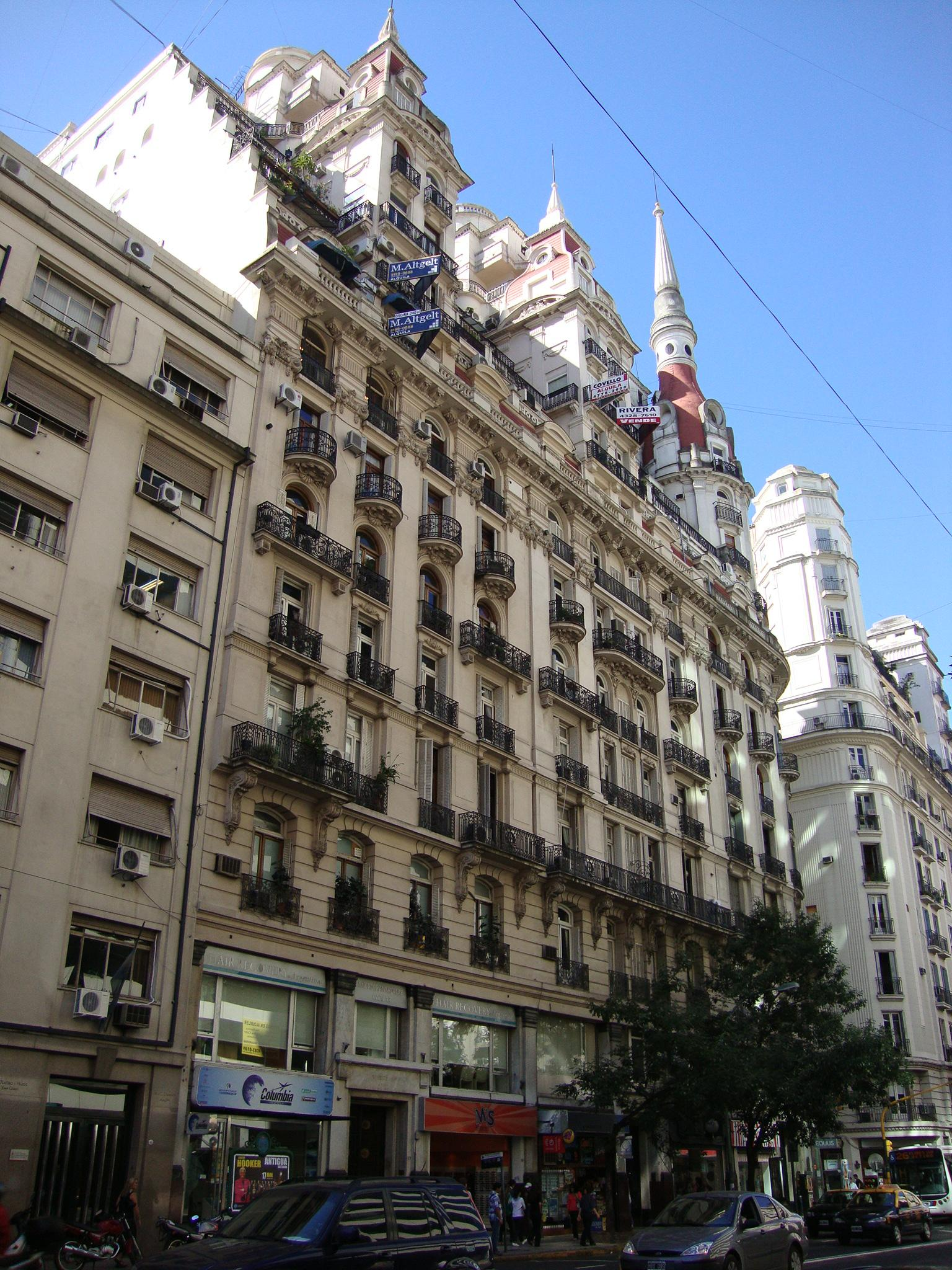 Vista desde la Avenida Córdoba hacia el este del edificio de departamentos proyectado por Eduardo Le Monnier para la constructora Bencich Hermanos en 1927. Está en la esquina de la Avenida Córdoba y la calle Esmeralda. En uno de sus departamentos vivió la poetisa Alfonsina Storni. Buenos Aires, Argentina.